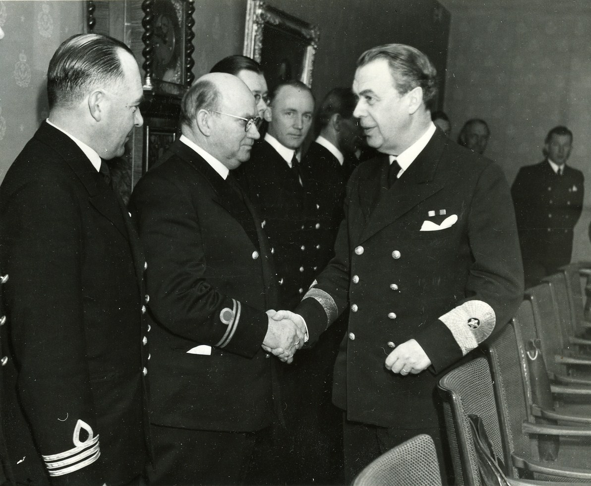 Sjövärnskonferensen 1947, chefen för Marinstaben, konteramiral Erik Anderberg (1892-1990), hälsar på mötesdeltagarna, här brandfogde Daniel Feyrabend från Karlskrona.